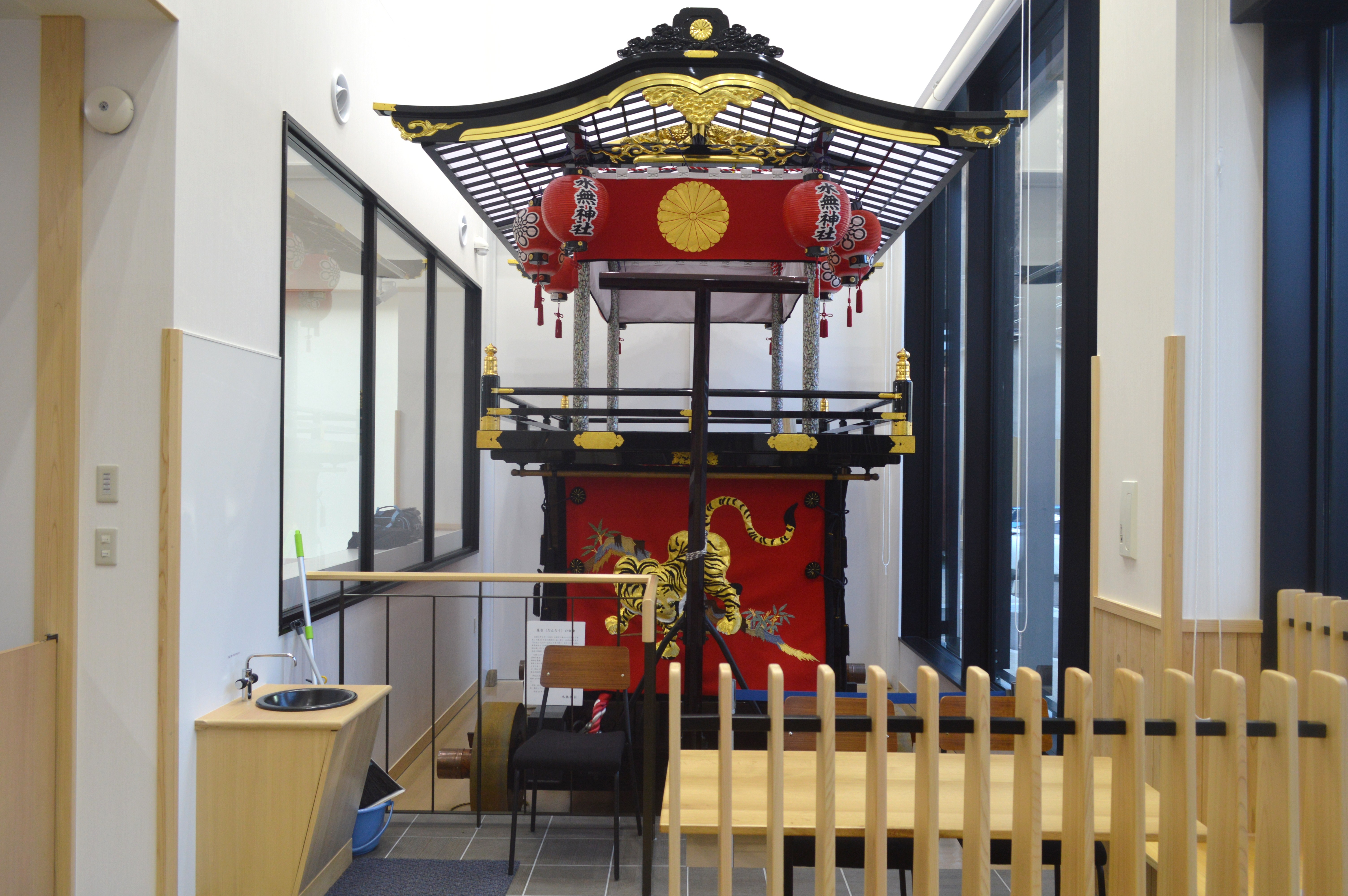 長野県木曽郡木曽町の木曽町図書館。